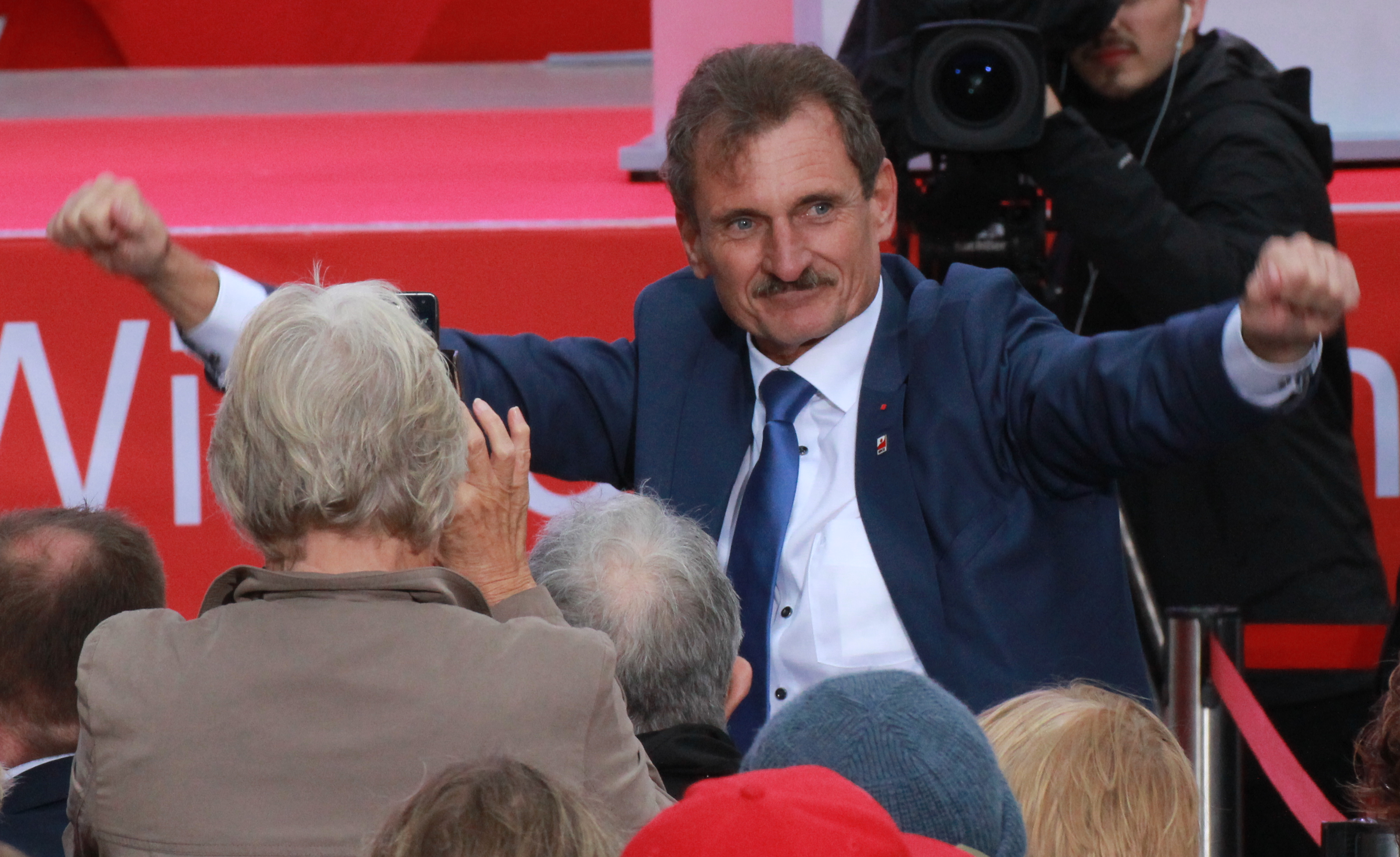 Ulrich Hampel, für die Bundestagswahl 2017 SPD-Kandidat für den Wahlkreis Coesfeld und Steinfurt II, bei einem Wahlkampfauftritt von SPD-Kanzlerkandidat Martin Schulz am 6. September 2017 in der Stubengasse in Münster.